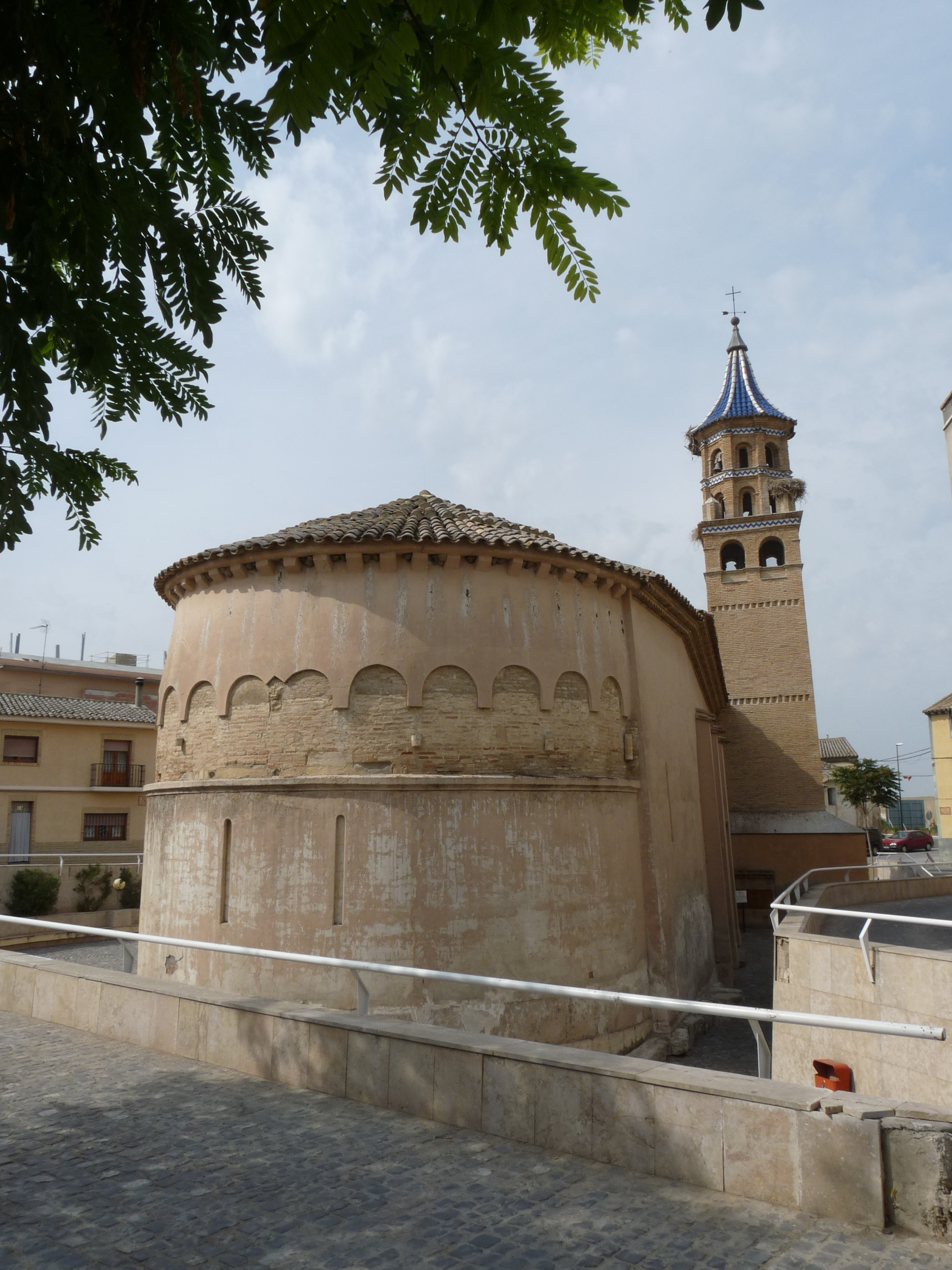 Tauste - Iglesia de San Antón (s. XII) - Ábside